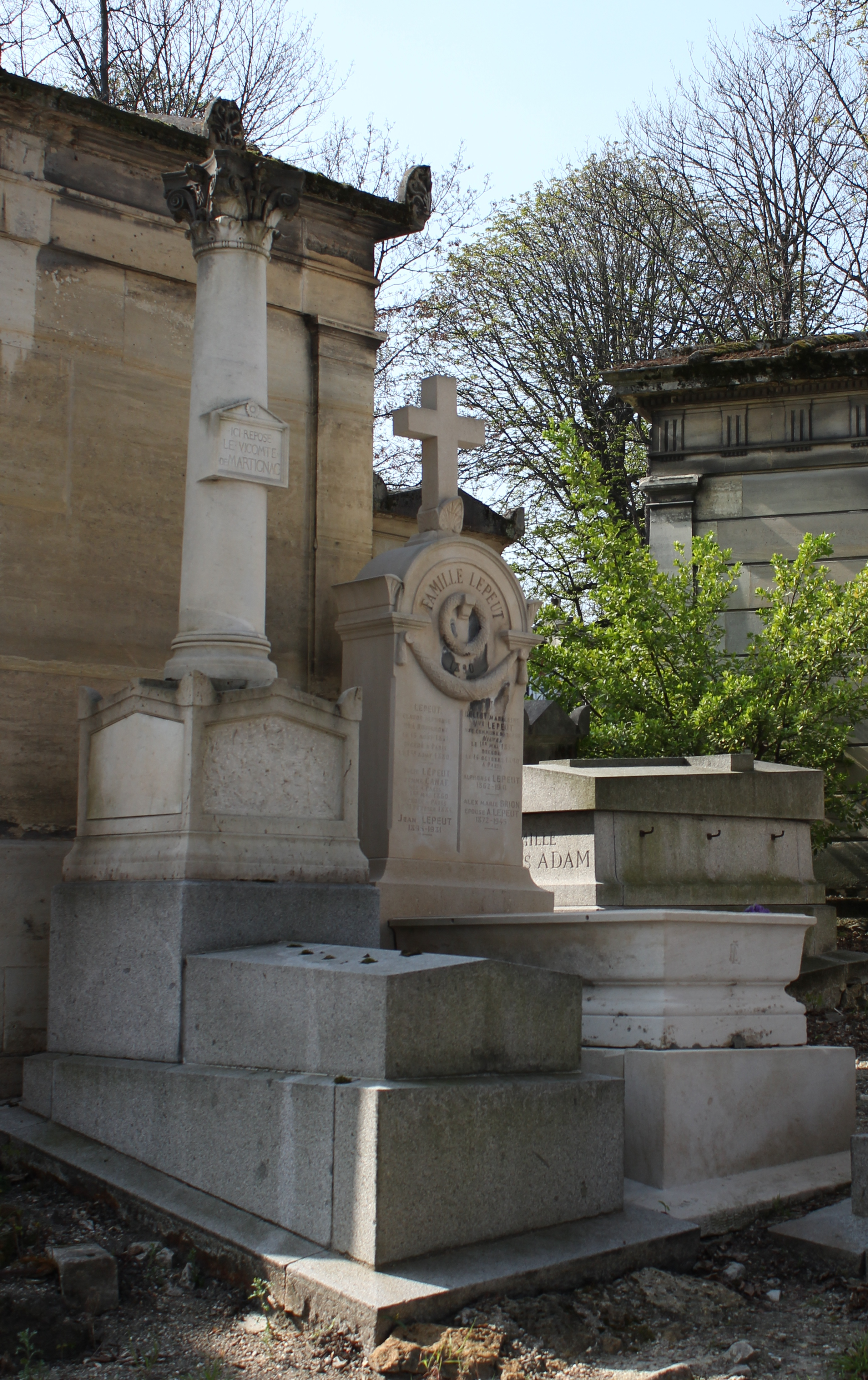 vue d'ensemble